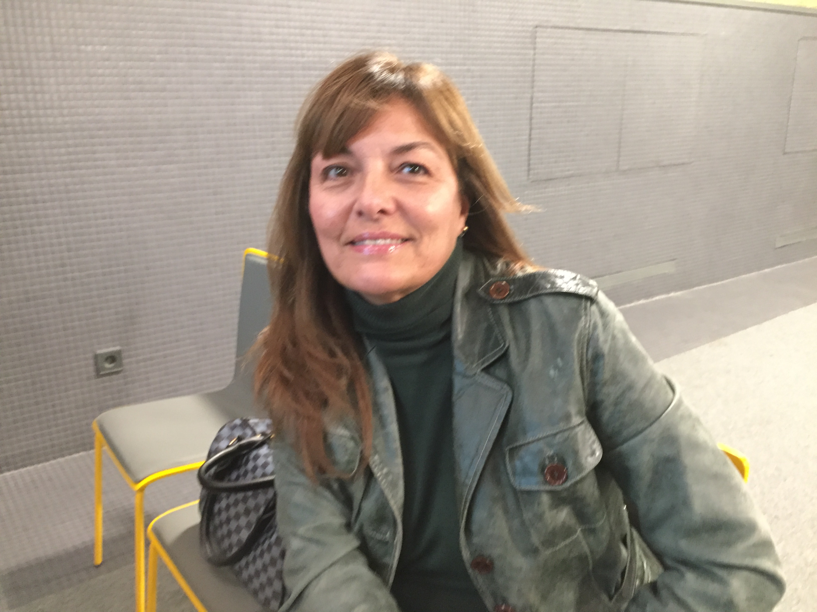 En asamblea Mav 2018